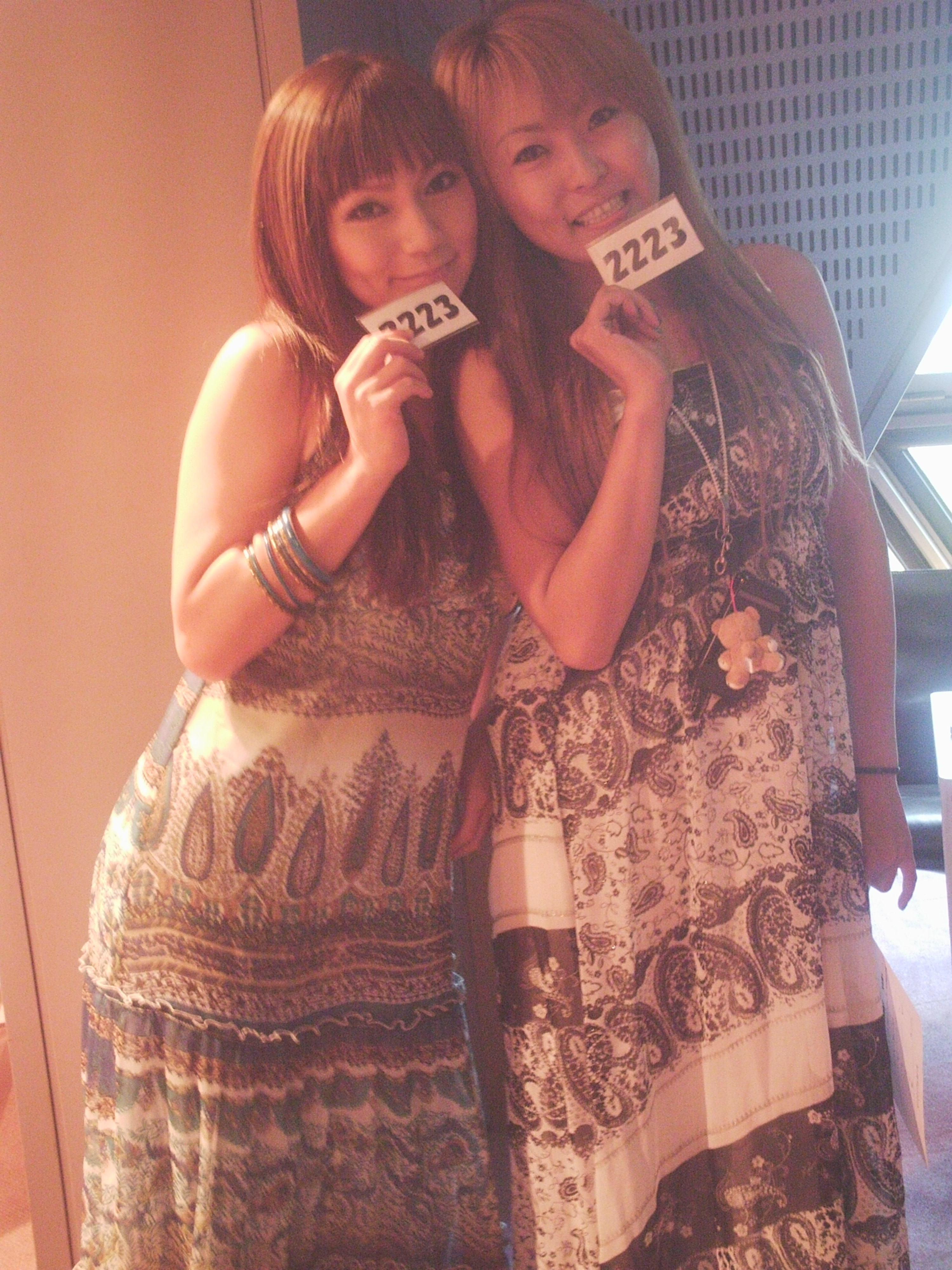 クレイジードールズ (2010年8月)